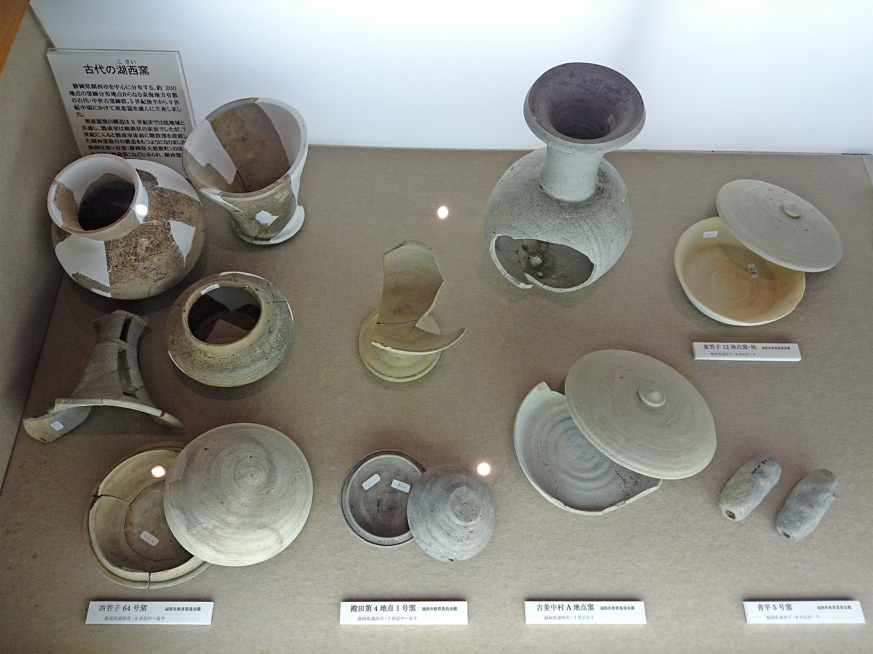 湖西窯跡群（静岡県湖西市）産の須恵器（愛知県陶磁美術館蔵）